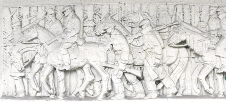 autor: Edmund Mikołaj Majkowski - polski artysta, rzeźbiarz